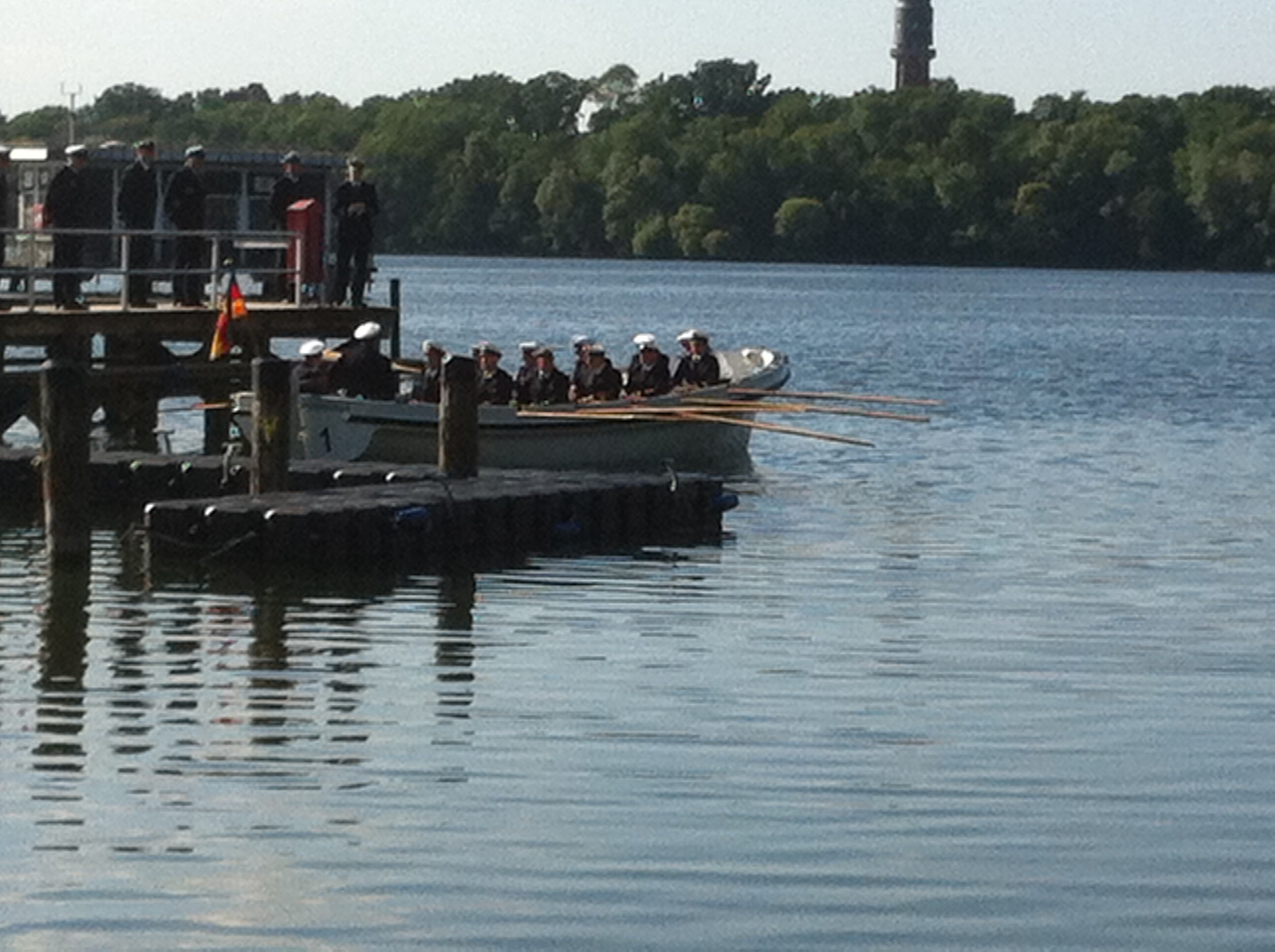 Zeremoniell beim Wechsel des Kommandeurs der Marineunteroffizierschule: Der scheidende Kommandeur wird mit einem Marinekutter vom Bootshafen am Großen Plöner See aus abgepullt.